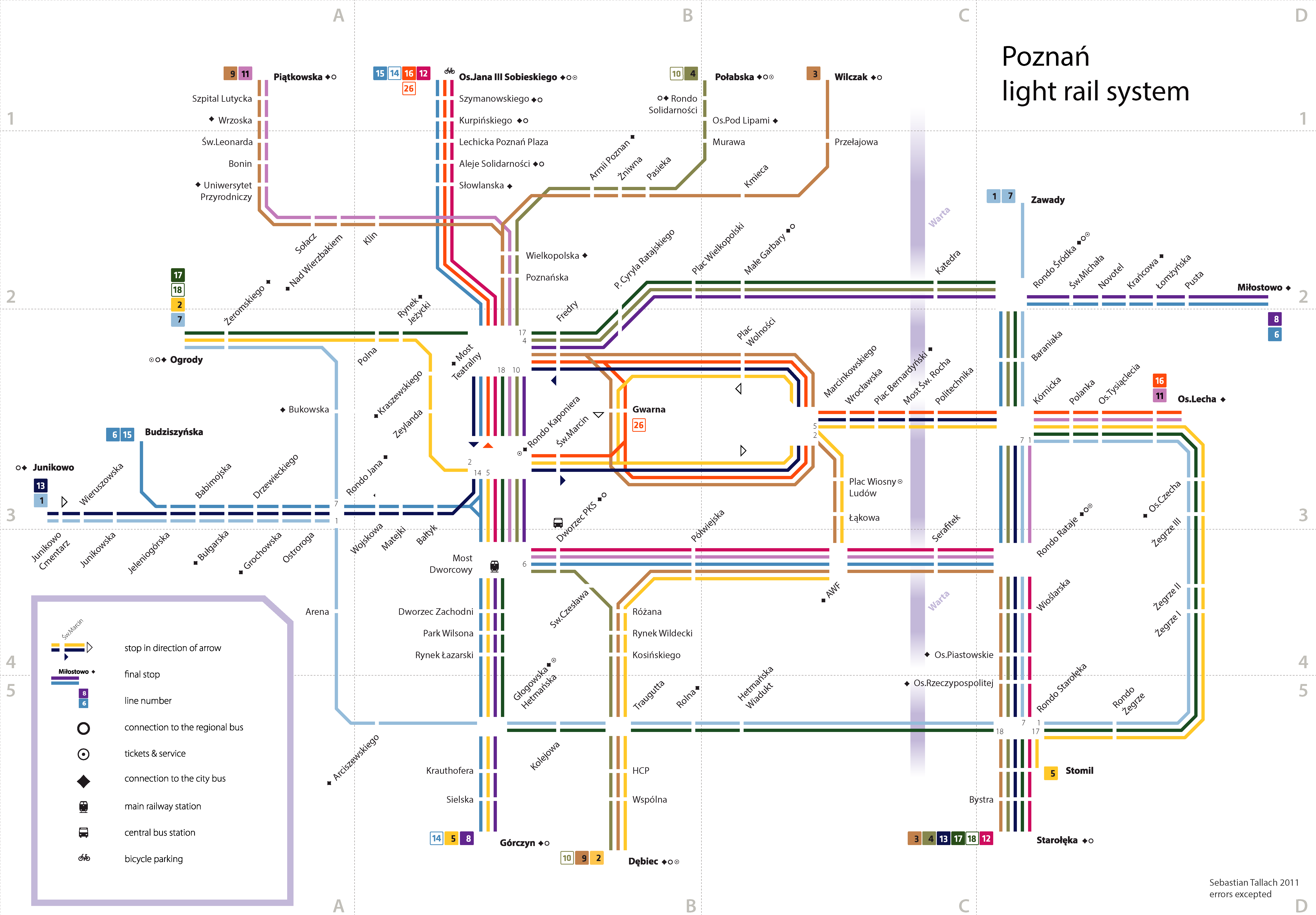 Straßenbahnnetz von Posen in Polen.